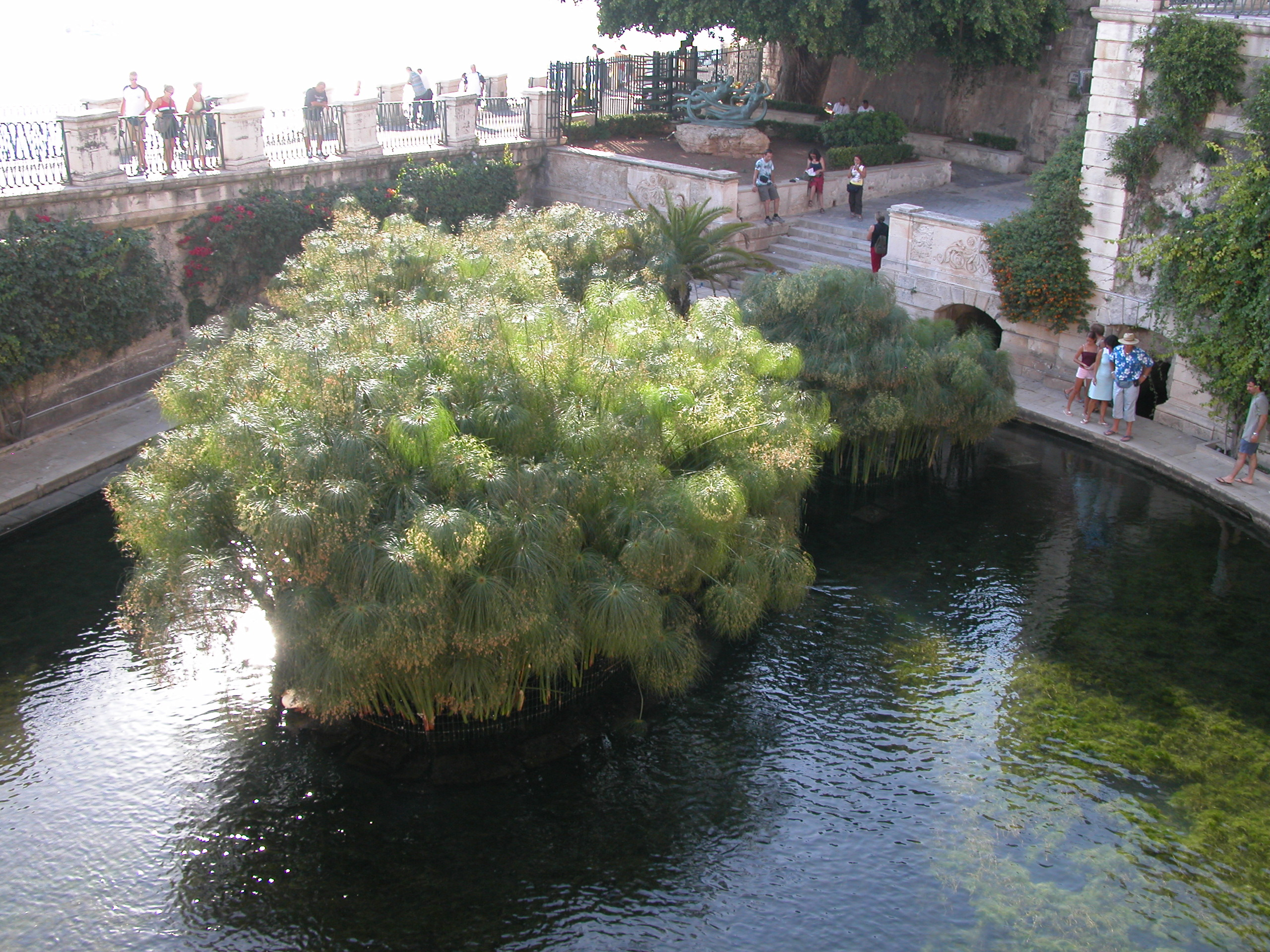 fonte Aretusa- Siracusa